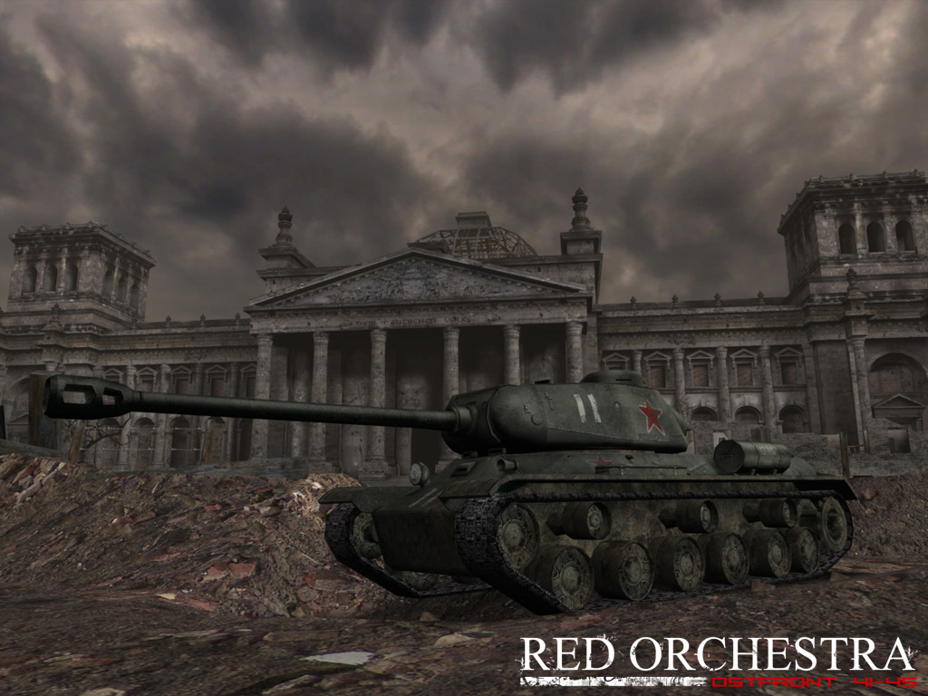 Red Orchestra Reichstag with Russian IS-2 tank